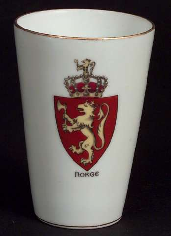 Krus i porselen med riksvåpen. Produsert på Porsgrunds Porselænsfabrik i første halvdel av 1900-tallet. Høyde 11,2 cm. Foto Anne-Lise Reinsfelt, Norsk Folkemuseum, NF.1960-0126.